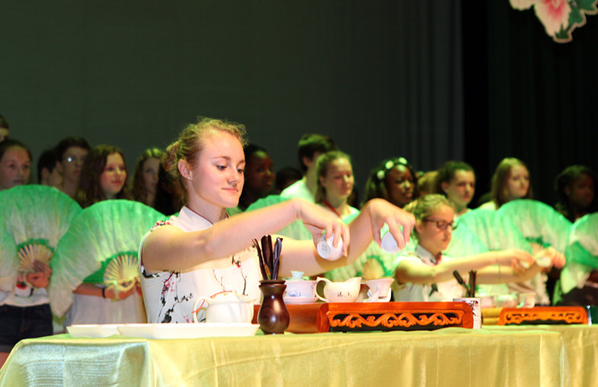 Tea_NEYC